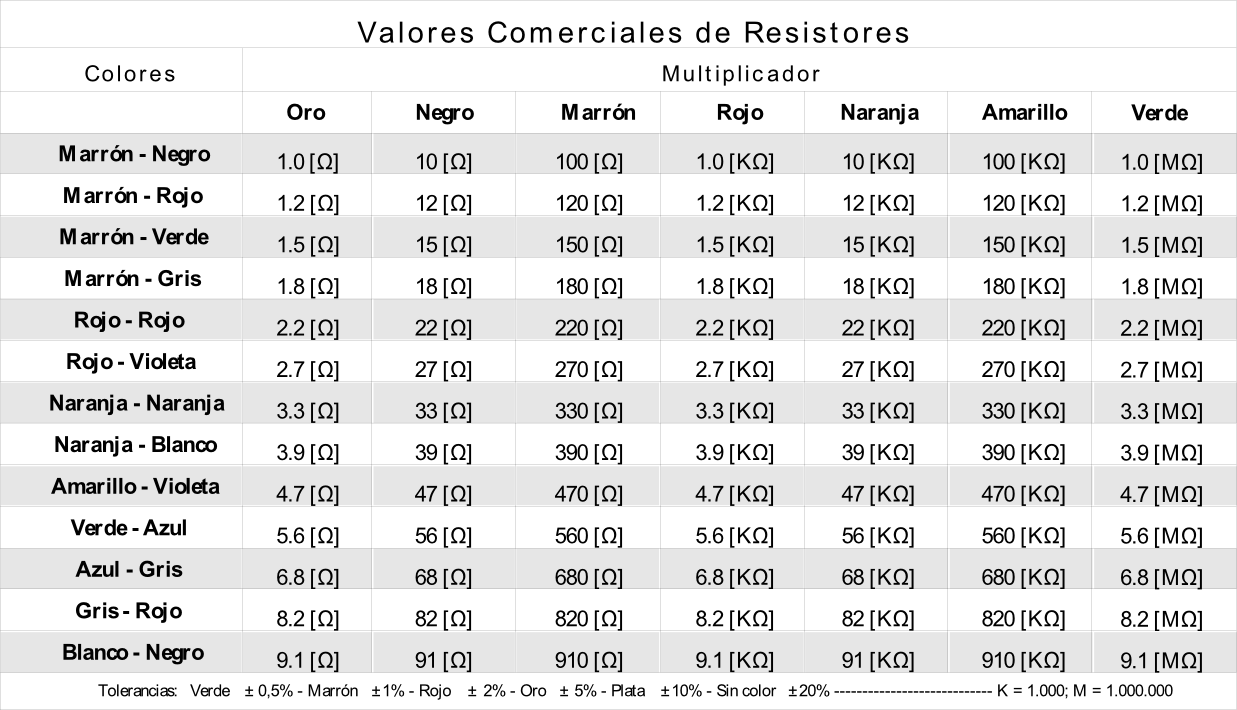 Tabla de Resistores Comerciales